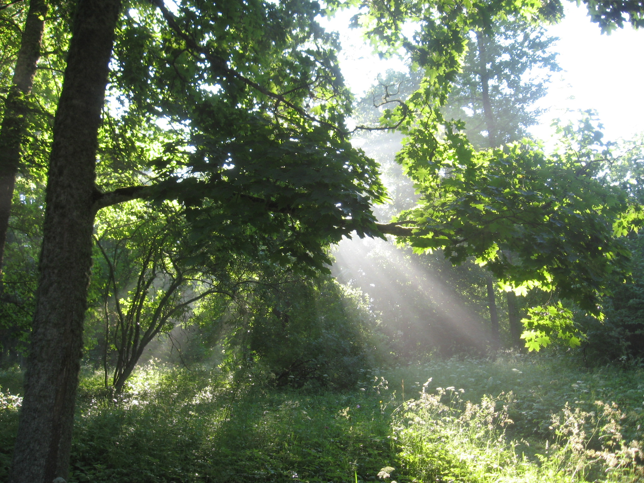 Udu Luua pargis (Luua Metsanduskool, Luua, Jõgeva maakond, Eesti)